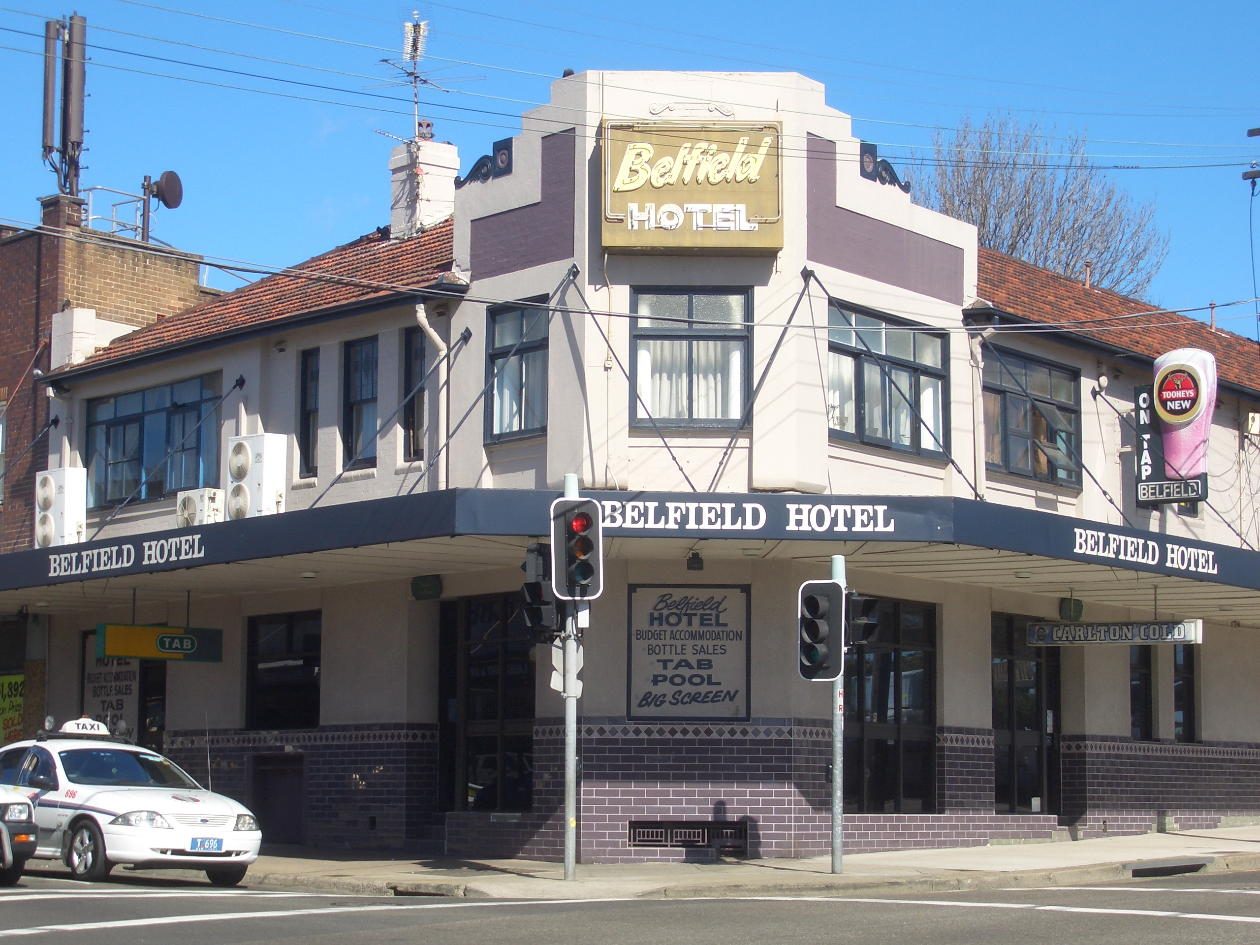 Belfield Hotel